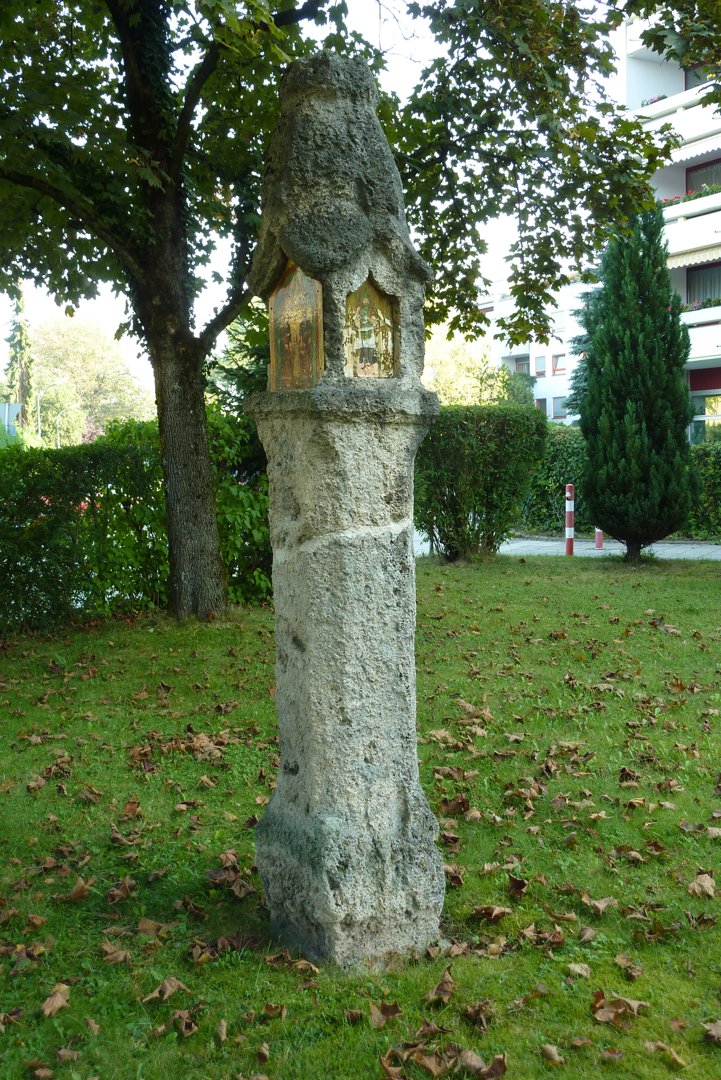 Baudenkmal: 82008 Unterhaching, Ecke Truderinger/von-Stauffenberg-Str Tuffsteinpfeiler Denkmal-Nummer: D-1-84-148-9 Standort: 48.064558 11.62508